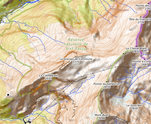 carte réalisée sur umap This map may be incomplete, and may contain errors. Don't rely solely on it for navigation.